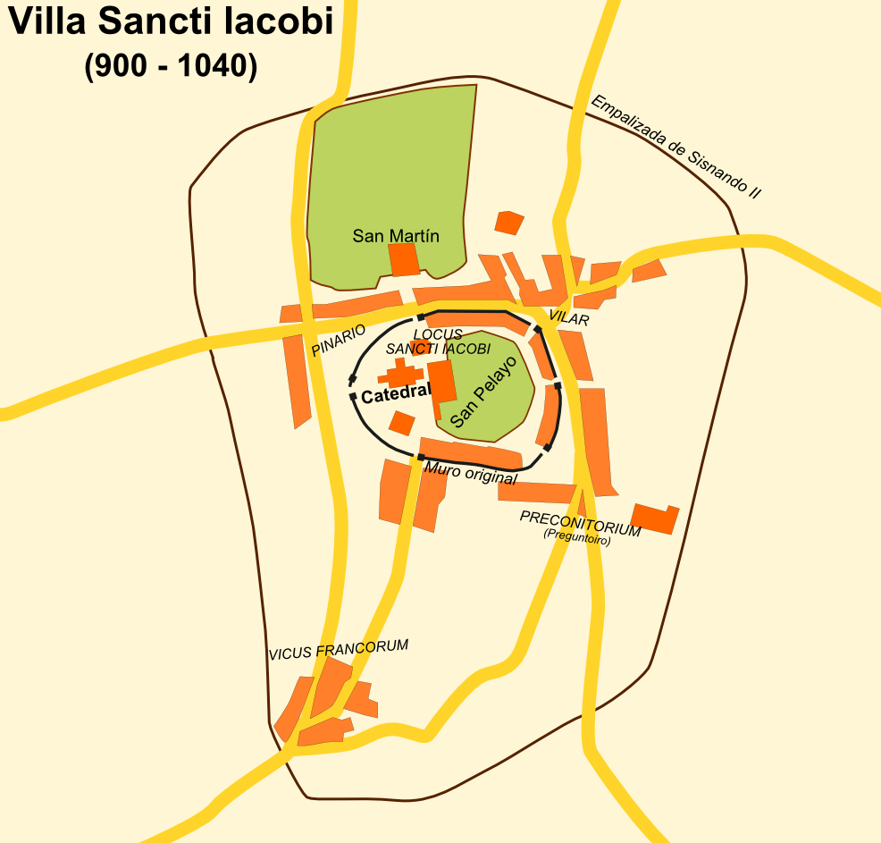 Plano aproximado de la Villa Sancti Iacobi, la ciudad de Santiago de Compostela entre los años 900 y 1040.